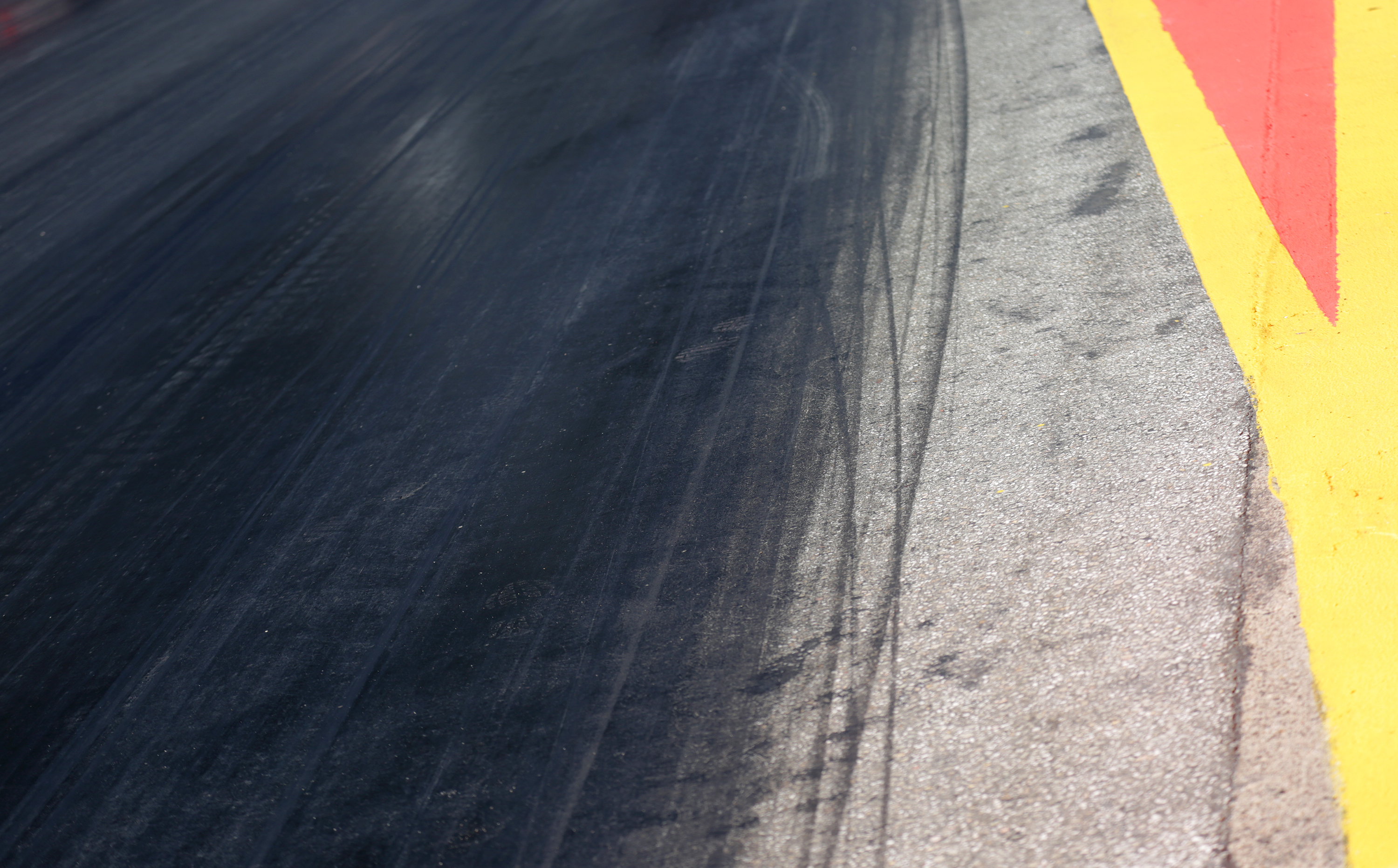 Foto, daß den Unterschied zwischen dem ursprünglichen Asphalt und der präparierten Oberfläche der Dragsterstrecke zeigt.